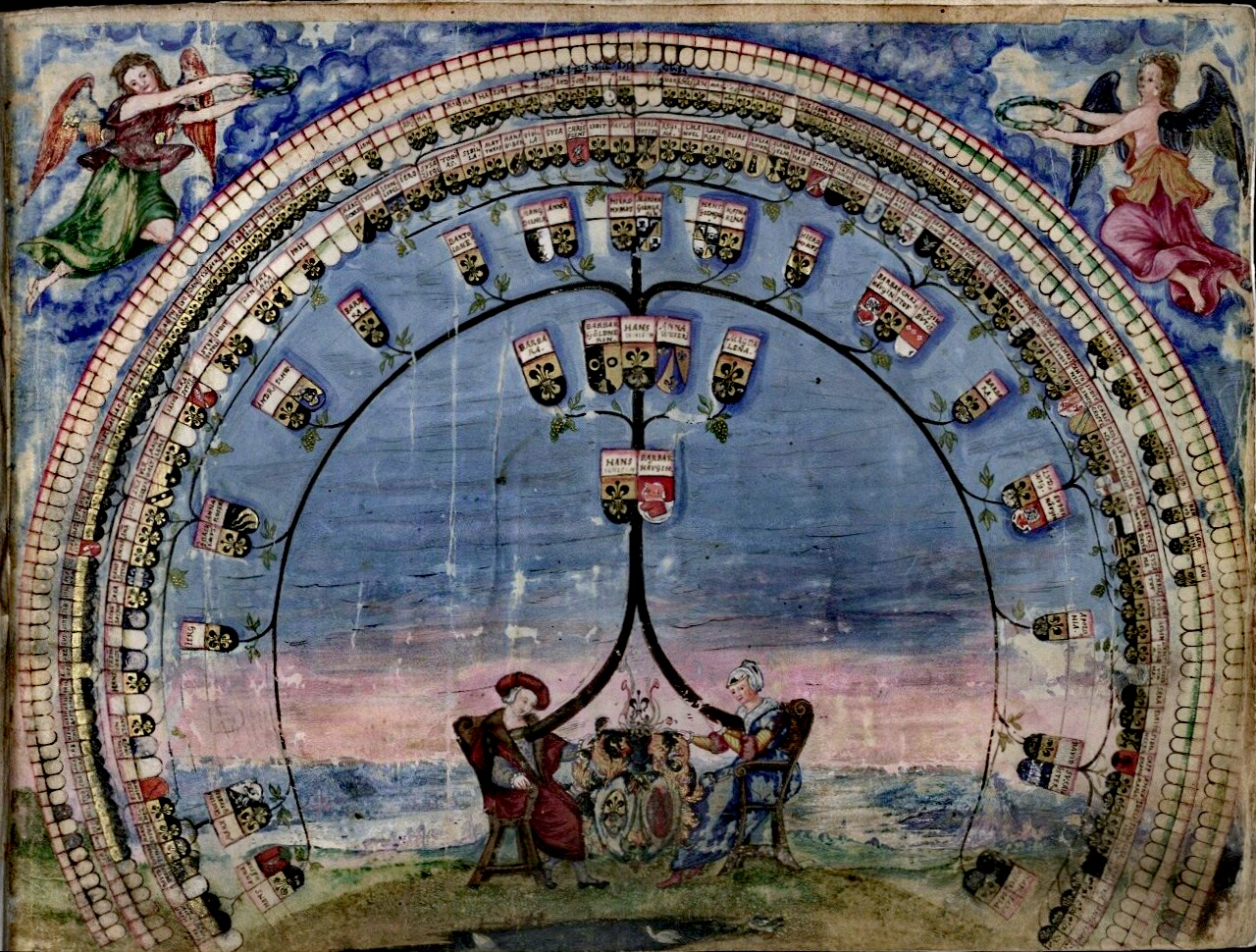 Genealogische Darstellung, Stammbuch Paul Jenisch, WLB Stuttgart Cod.hist.qt.298